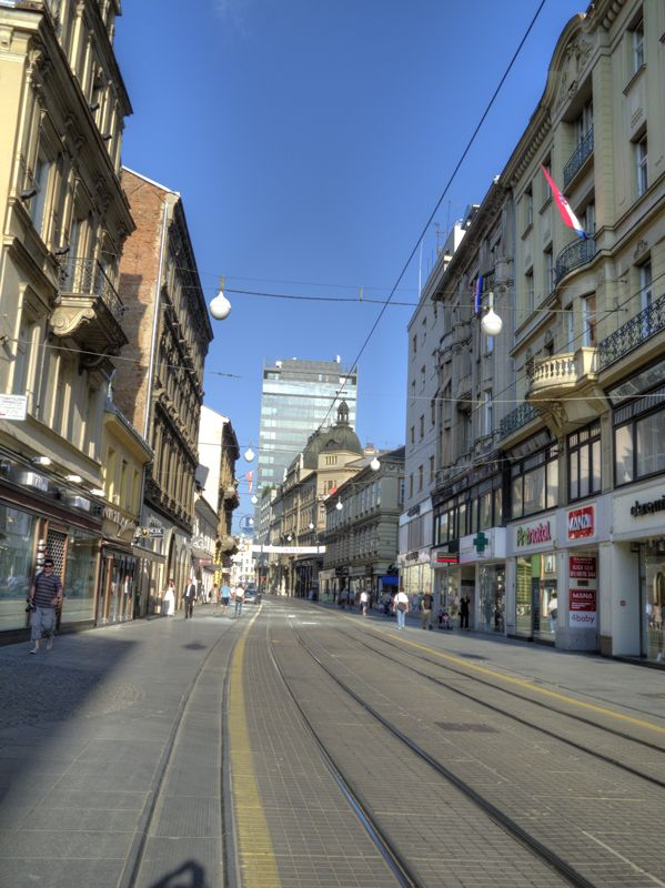 Zagreb